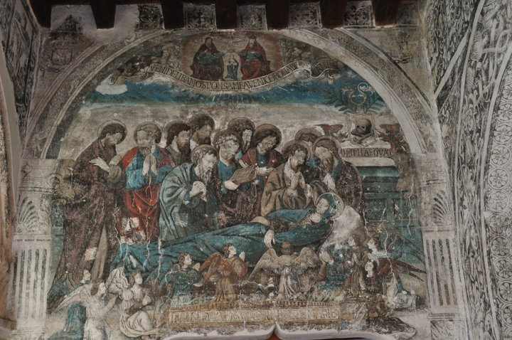 frescos (monasterio epazoyucan)